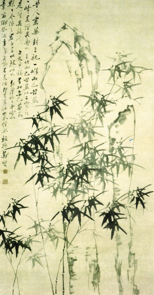 Bambous et rocher par le peintre chinois Zheng Xie (1693-1765). Rouleau mural, encre sur papier, dynastie des Qing. 170X90cm. Musée d'art de Tianjin.